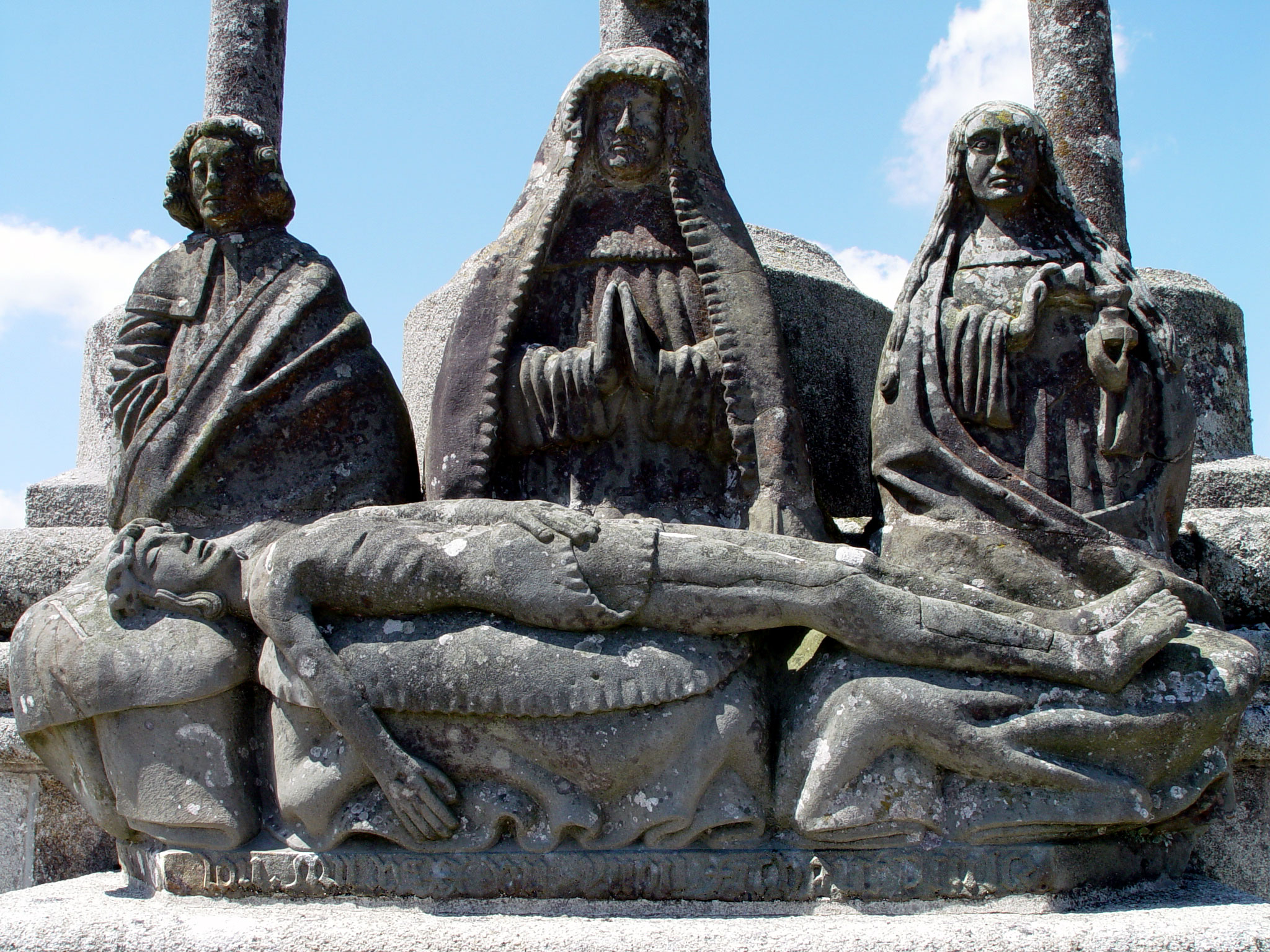 Laz (Bretagne, Finistère) Calvaire.Auf dem Sockel Pieta begeleitet von Johannes und Maria Magdalena. Inschrift am Fuß der Plastik: : LAN MIL VC XXVII YVON FICHAUT PSULCS (sculps.).